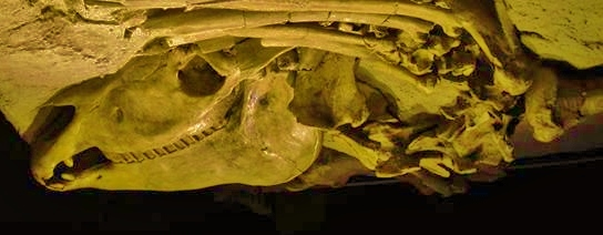 Fossil of Equus, an extinct mammal - Museum of Natural History Lima